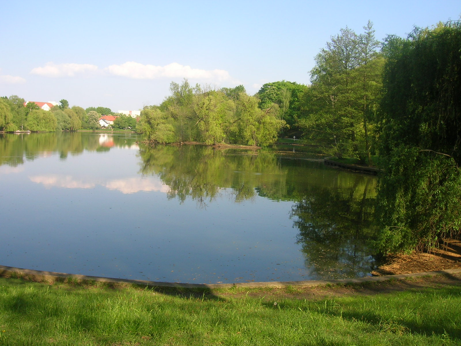 Obersee in Berlin-Alt-Hohenschönhausen